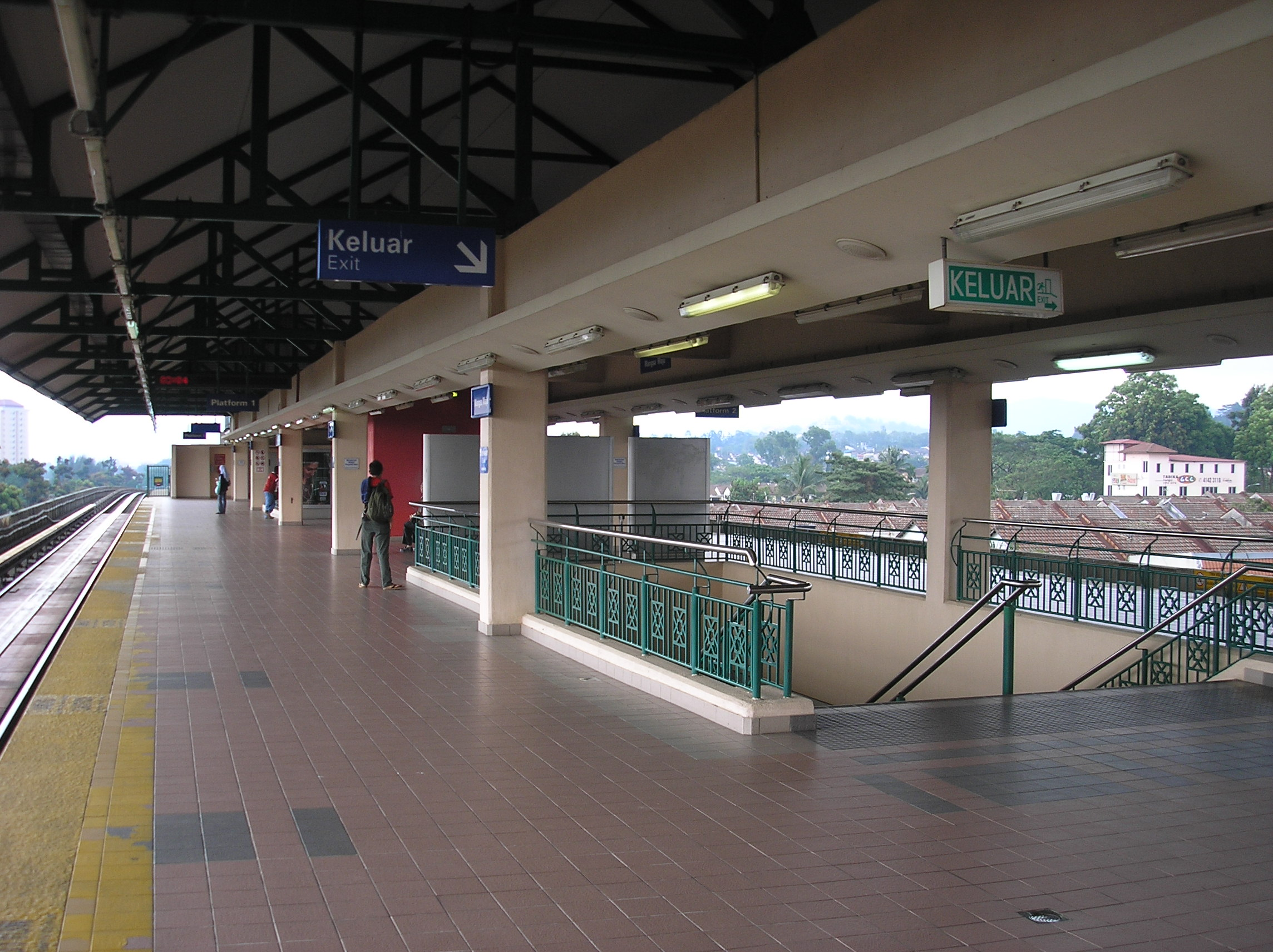 The Wangsa Maju LRT station (Kelana Jaya Line), Kuala Lumpur, Malaysia.